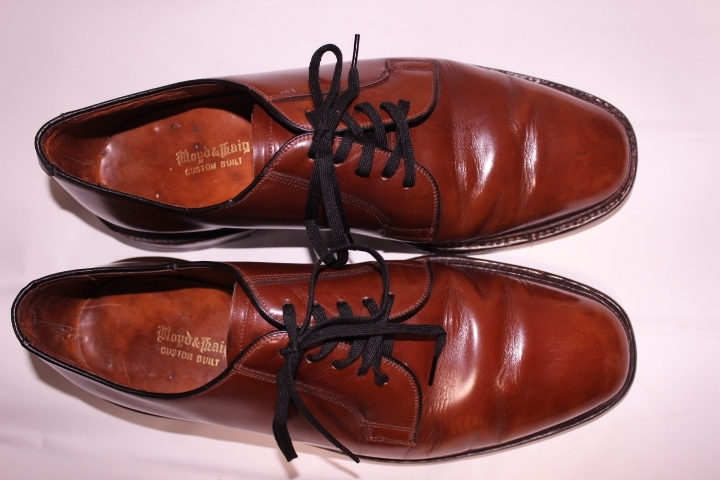 Lloyd & Haig（ローク製）ダービーシューズ